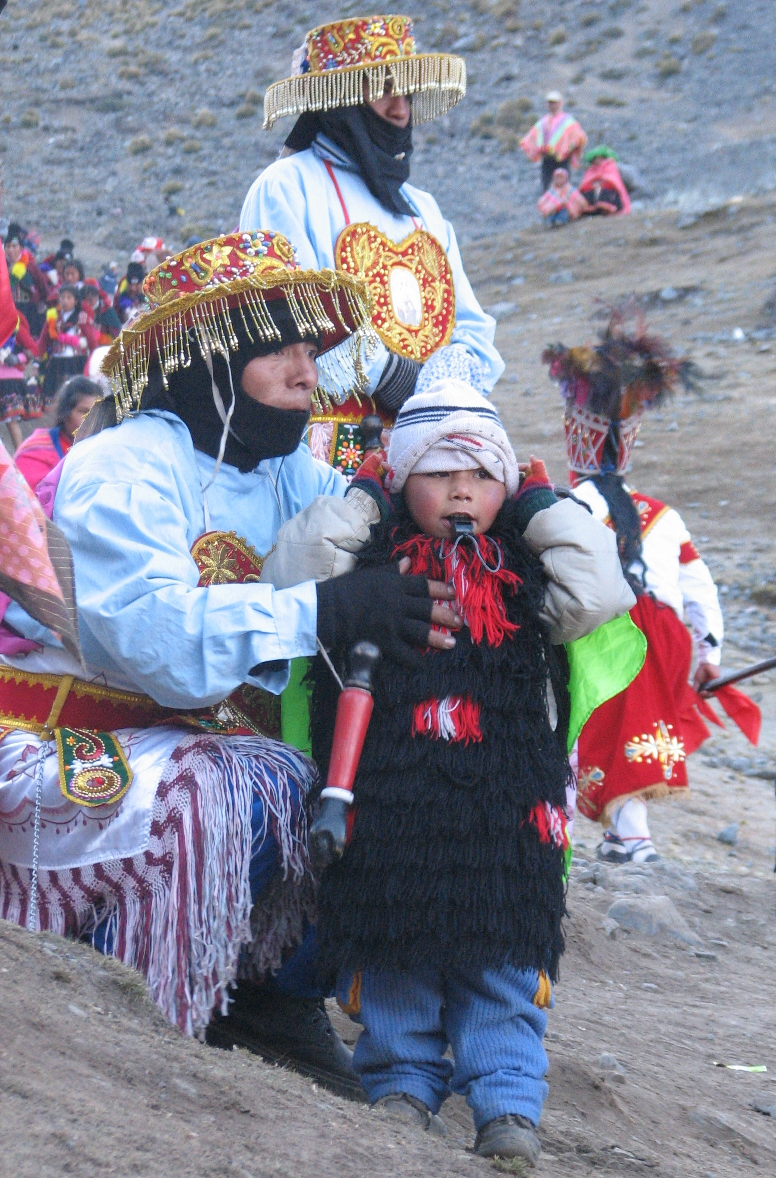 Qoyllur_Rit'i: Festival señor de Qoyllur Rit'i, young dancer